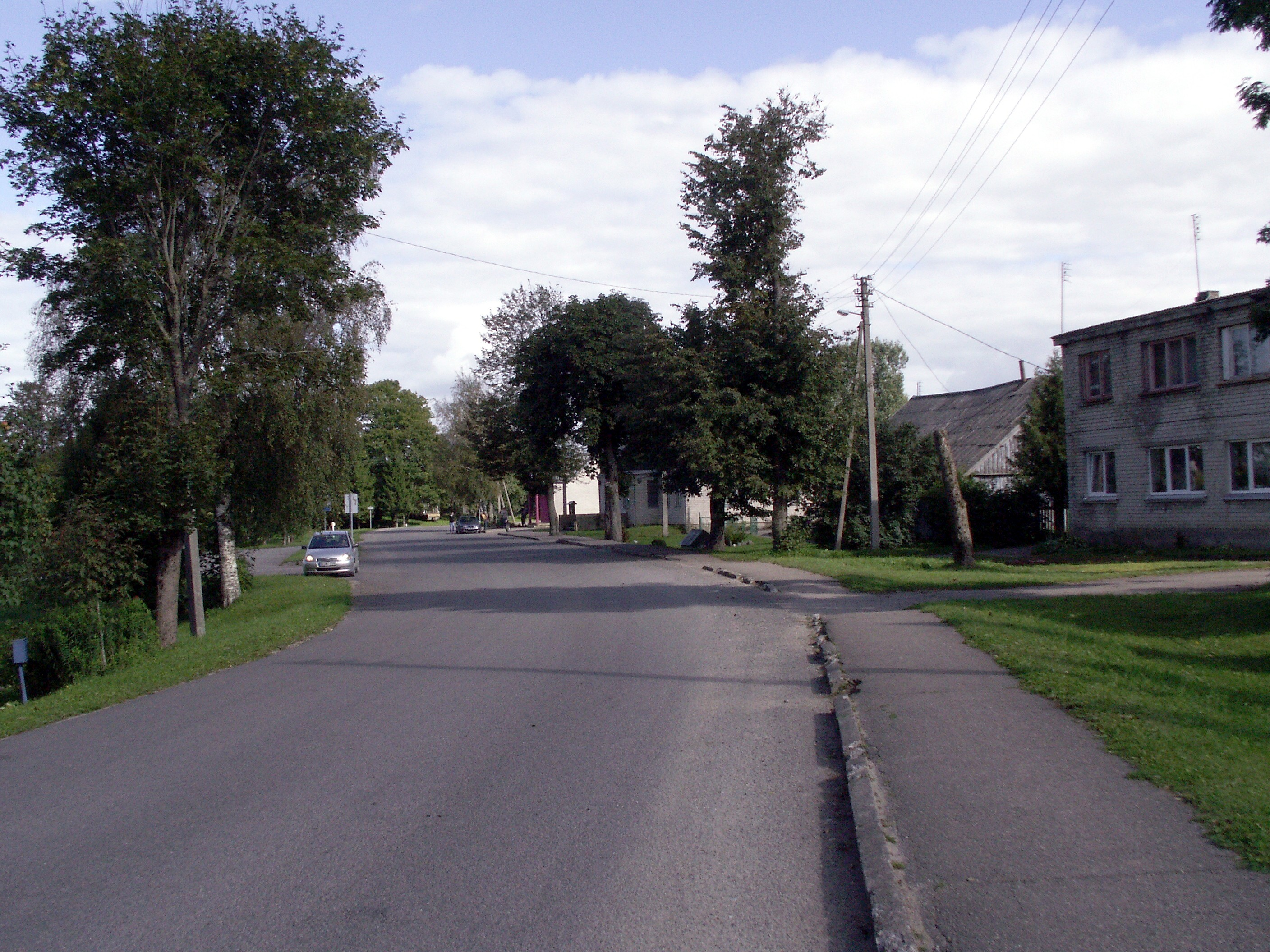 Požėrė, Šilalės rajonas, Lietuva